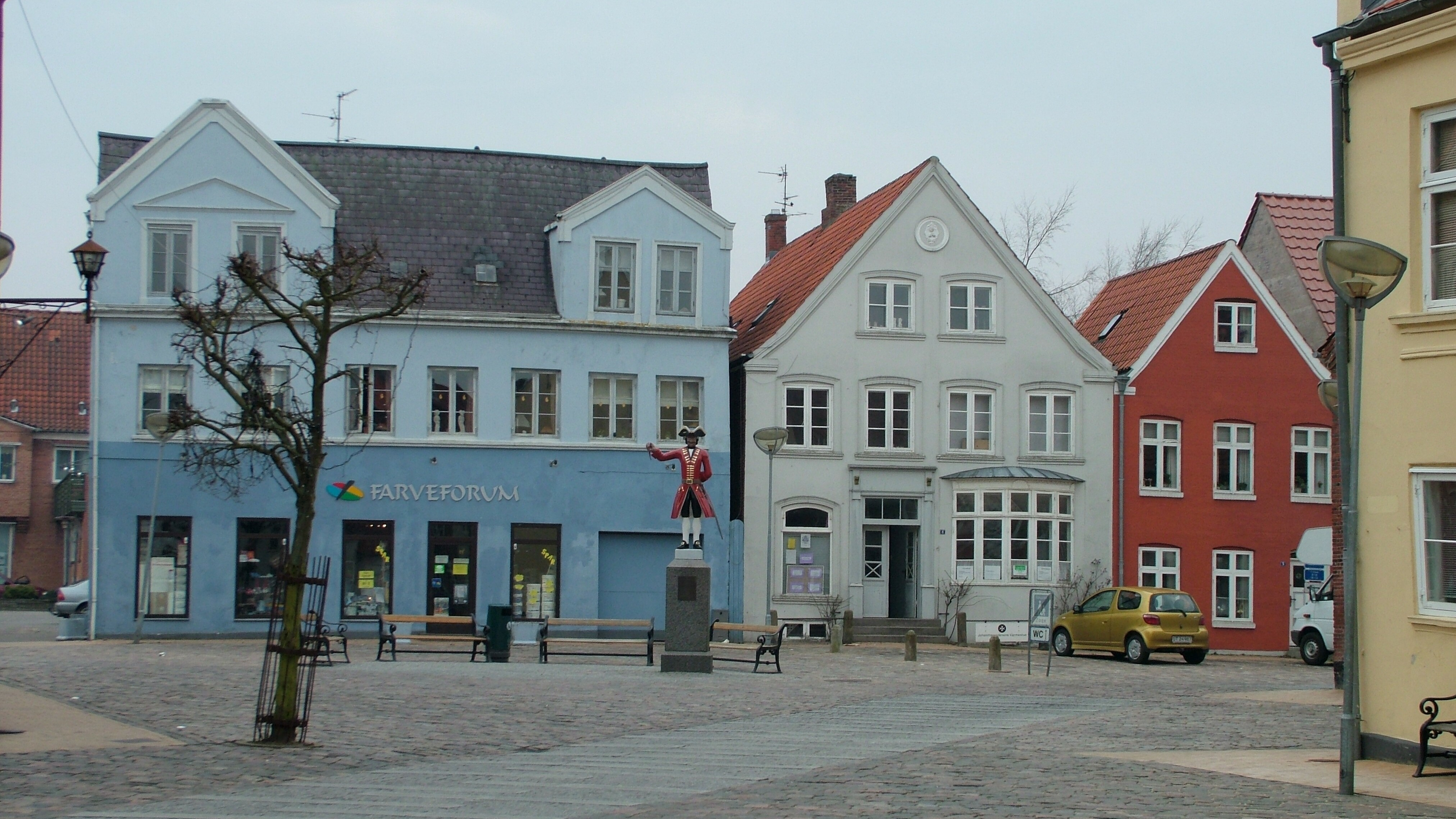 Tønder (Tondern), Denmark, der Marktplatz Torvet